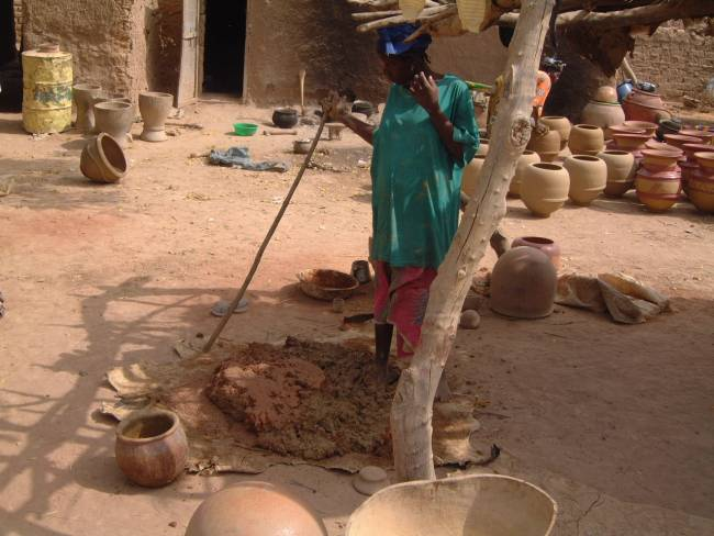 Photo du malaxage de la terre par les femmes. prise par Nerijp